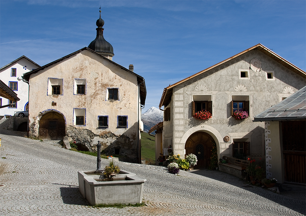 Mitten in Tschlin umgeben von Engadiner Häusern